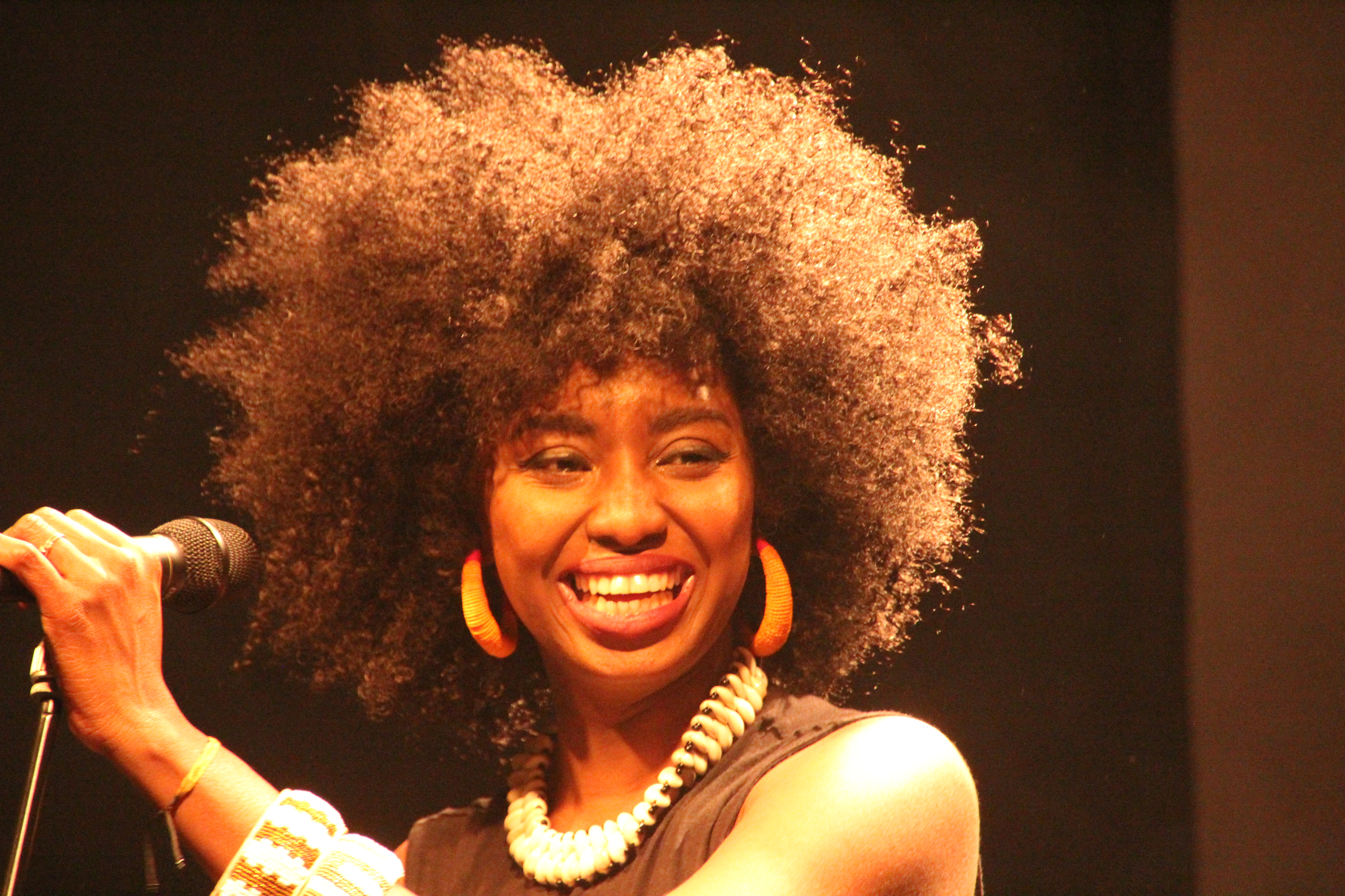 Bildinhalt: Die malische Sängerin Inna Modja bei einem Auftritt in der Hausener Brotfabrik Aufnahmeort: Frankfurt am Main, Deutschland Die dargestellte Künstlerin wurde bei einem öffentlichen Auftritt fotografiert.